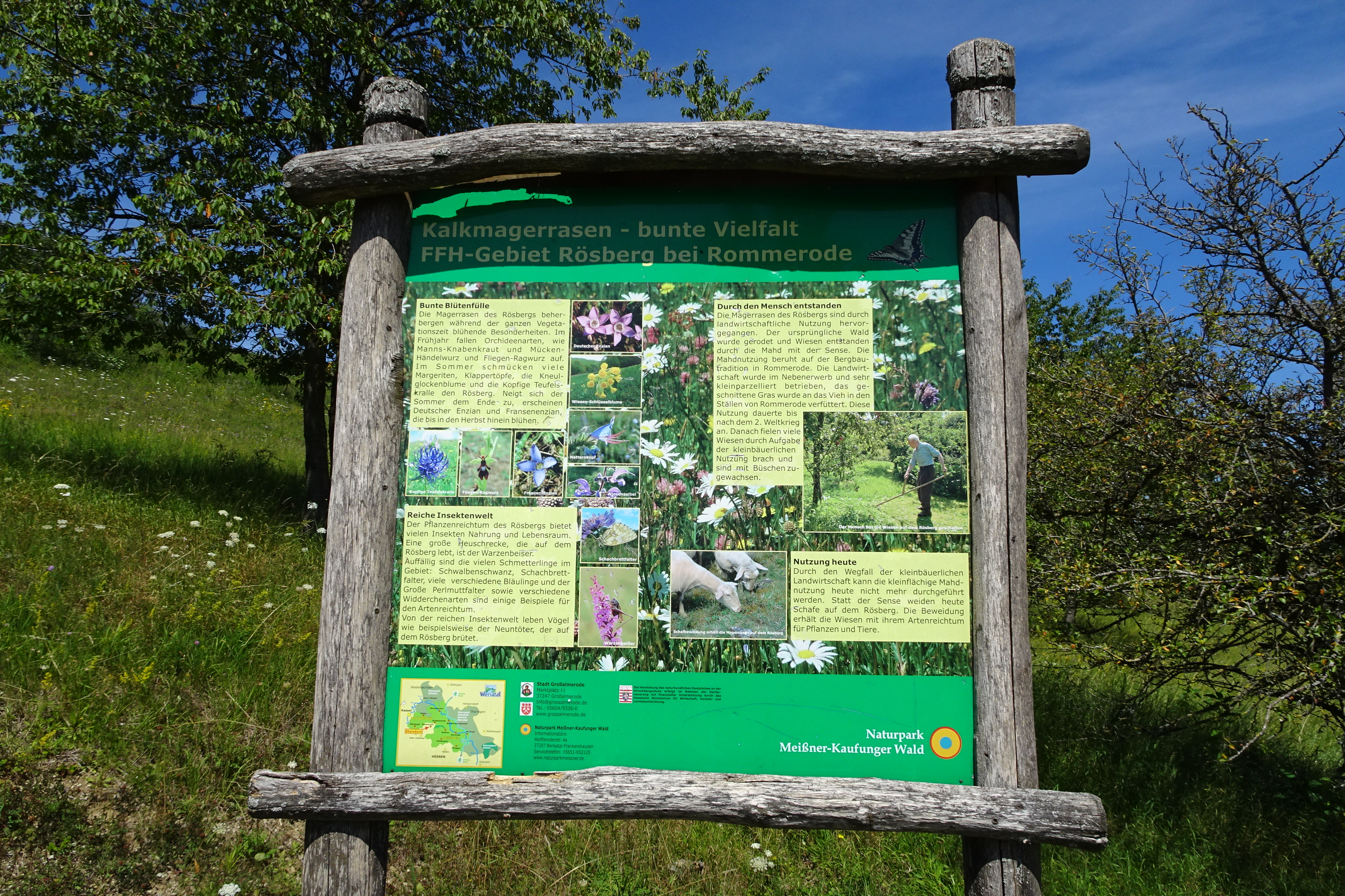 Der Rösberg erhebt sich mit einer Höhe von 539,4 m aus der Mittelgebirgslandschaft des Kaufunger Waldes, südöstlich von Rommerode, einem Ortsteil der Stadt Großalmerode im nordhessischen Werra-Meißner-Kreis. Er wird geprägt von Kalkmagerrasen, Wirtschaftsgrünland, Äckern und Wäldern, die sich kleinräumig miteinander abwechseln und ein vielgestaltiges Landschaftsbild ergeben. Wegen dem Vorkommen von besonders schutzwürdigen Tier- und Pflanzenarten auf seinen Grünlandflächen, wurde er als ein Flora-Fauna-Habitat-Gebiet zu einem Bestandteil des europaweiten Schutzgebietssystems Natura 2000, das eine länderübergreifende Vernetzung von bedrohten Lebensräumen zum Ziel hat. Auf den Halbtrockenrasen, die durch die Bewirtschaftung des Menschen entstanden sind, finden sich mehr als sechzig verschiedene Pflanzenarten, von denen viele als selten und gefährdet angesehen werden.